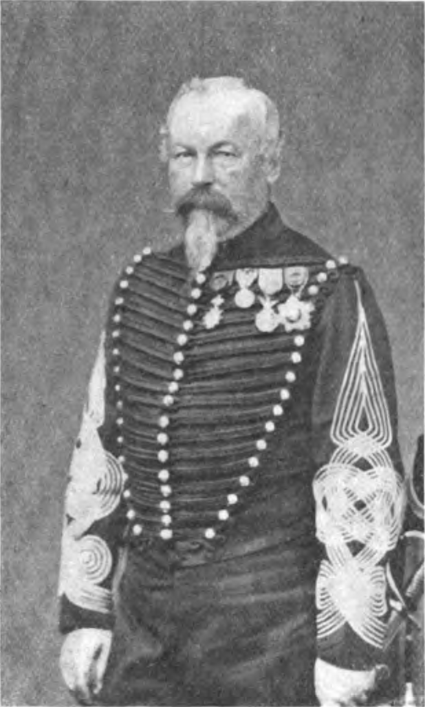 Portrait d'Adrien de Tucé dans Une famille de républicains fouriéristes : les Milliet de Paul Milliet (Q3371845), premier volume, page 294.